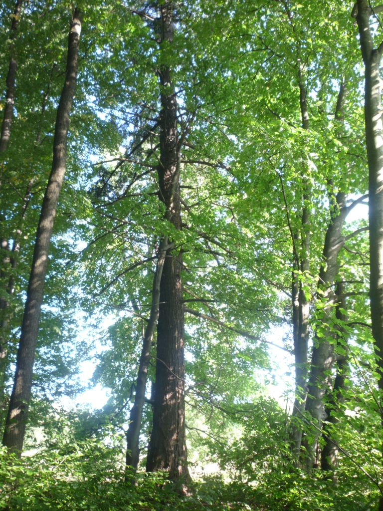 Pomnikowa Daglezja zielona w Gradówku